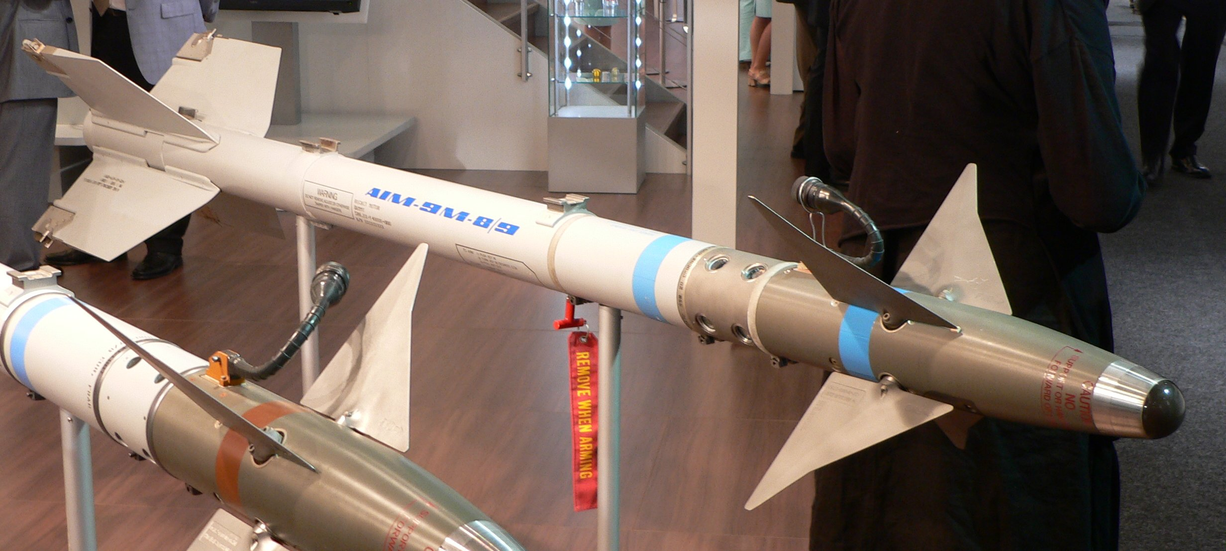 AIM-9M Sidewinder